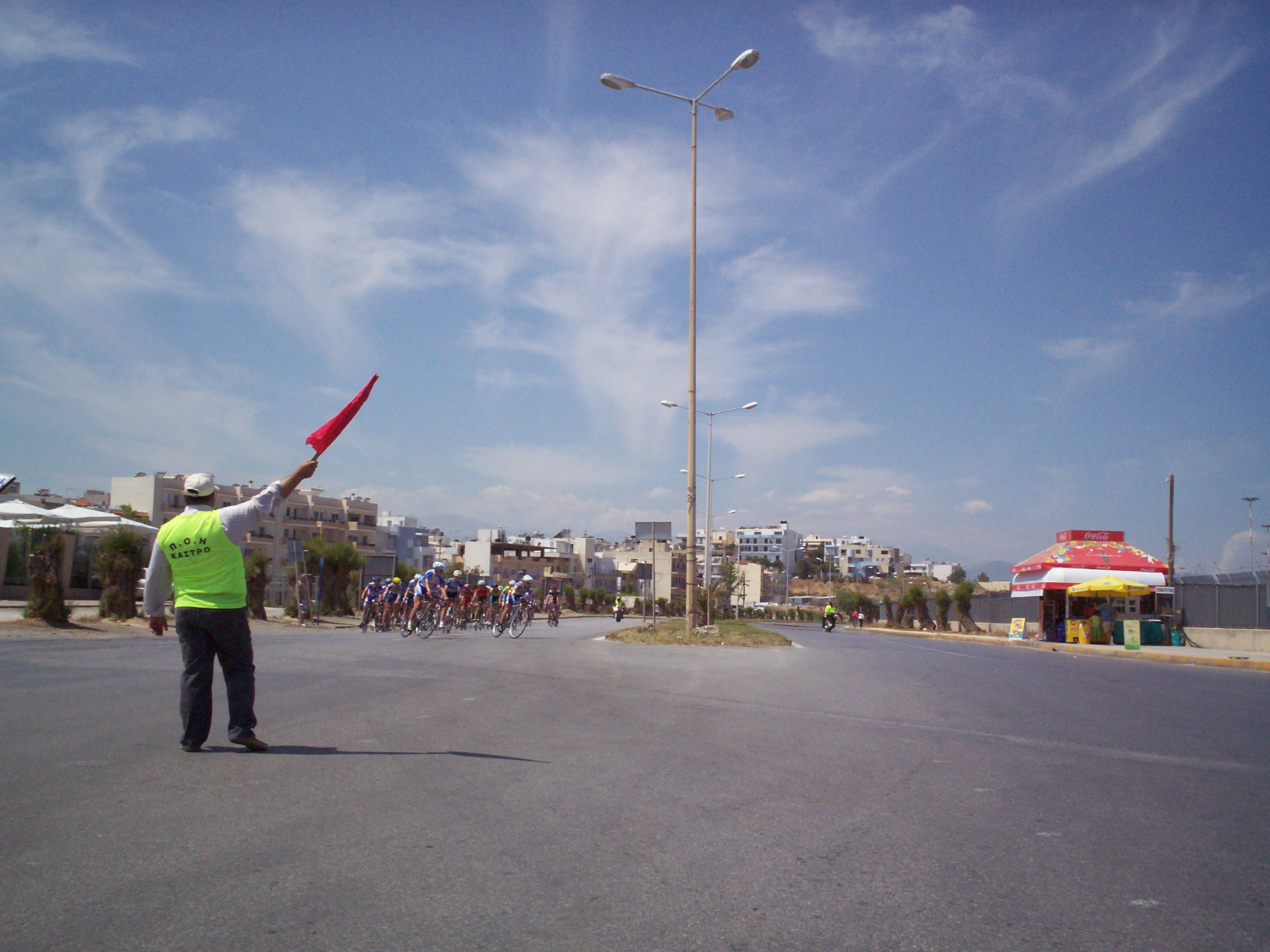 circuito ciclistico iraklion